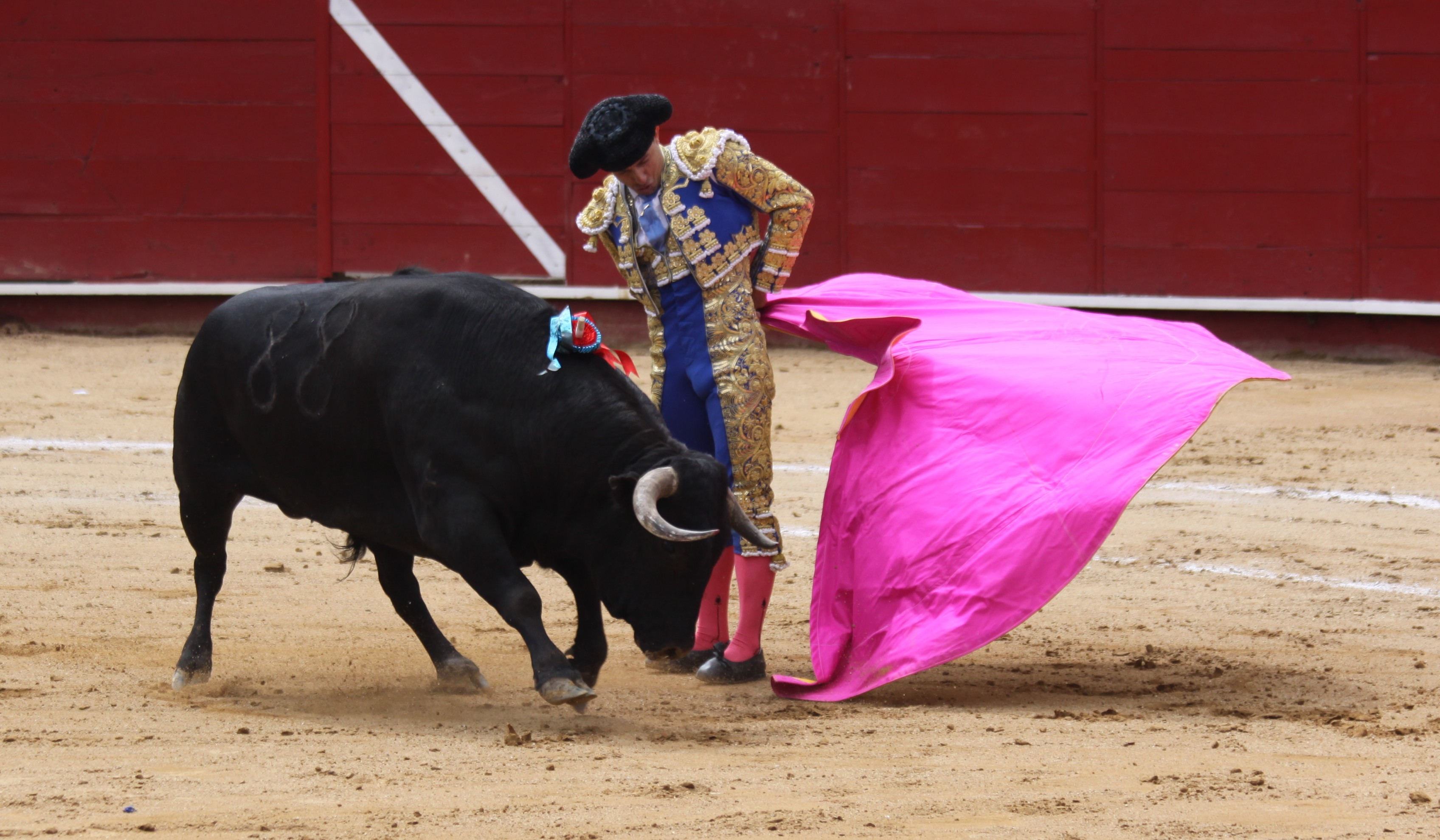 Rafaelillo, torero español.